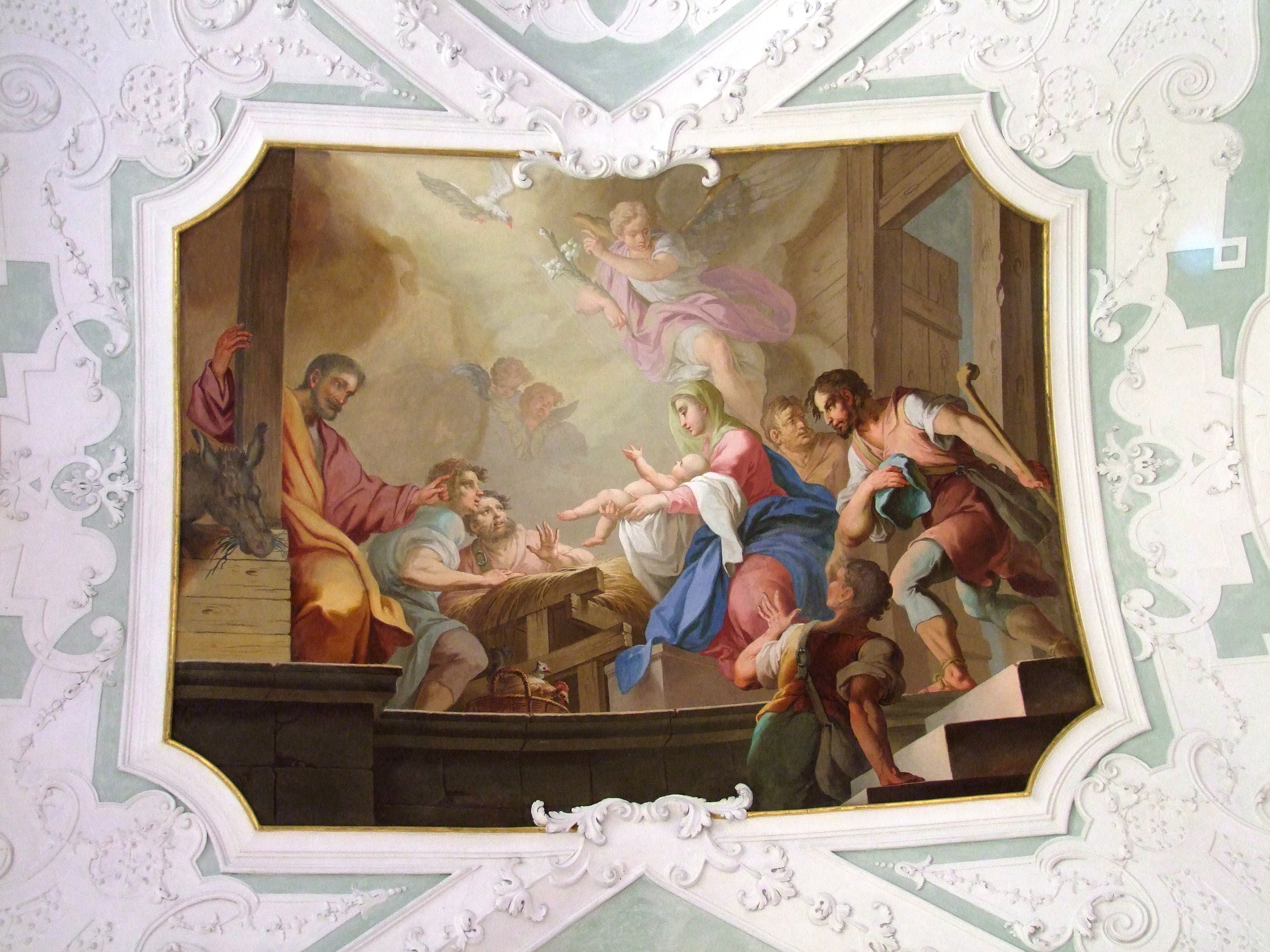 St. Georg, ehemalige Klosterkirche des oberschwäbischen Klosters Ochsenhausen